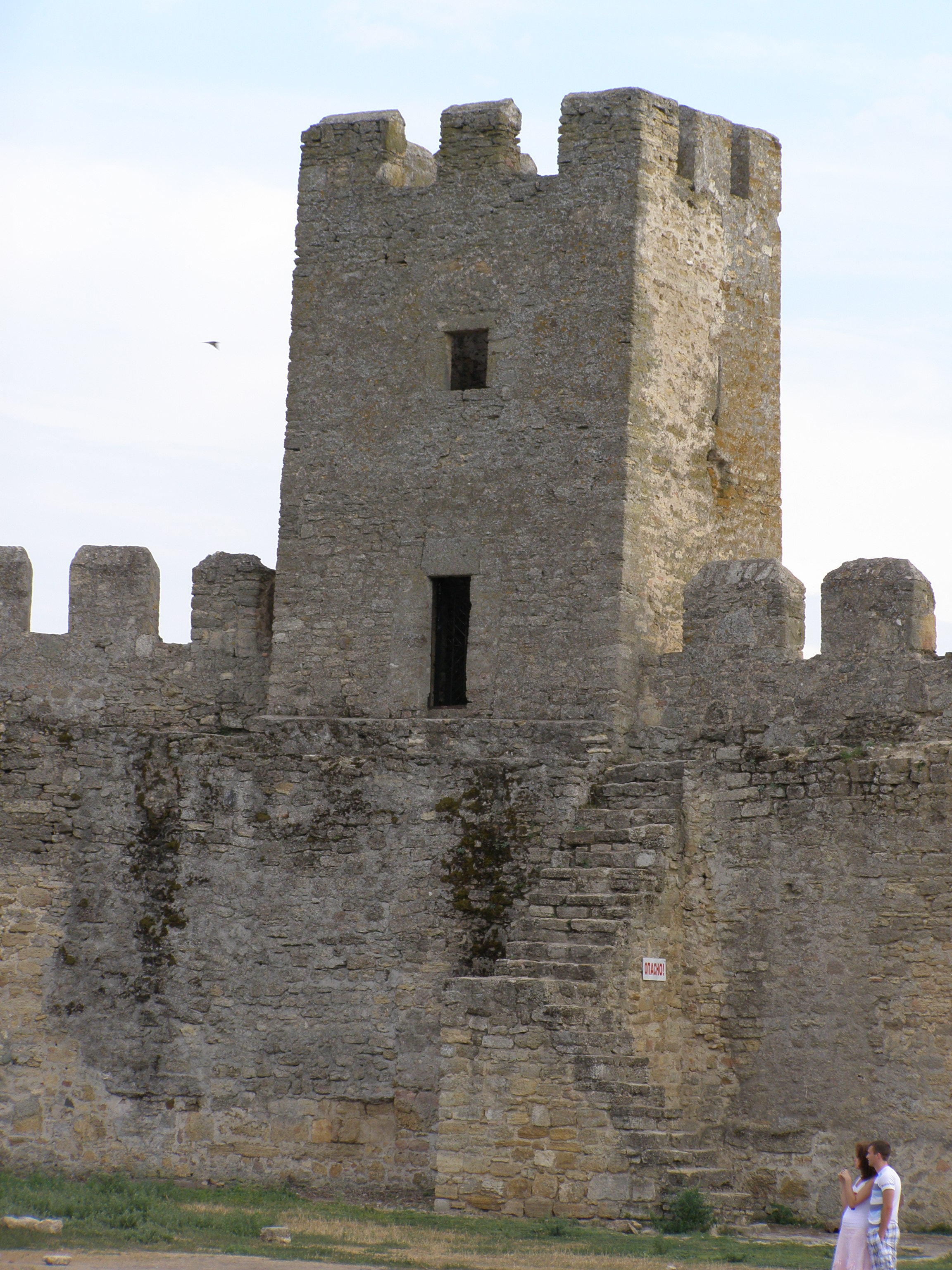 Аккерманська фортеця (Білгород-Дністровська фортеця)